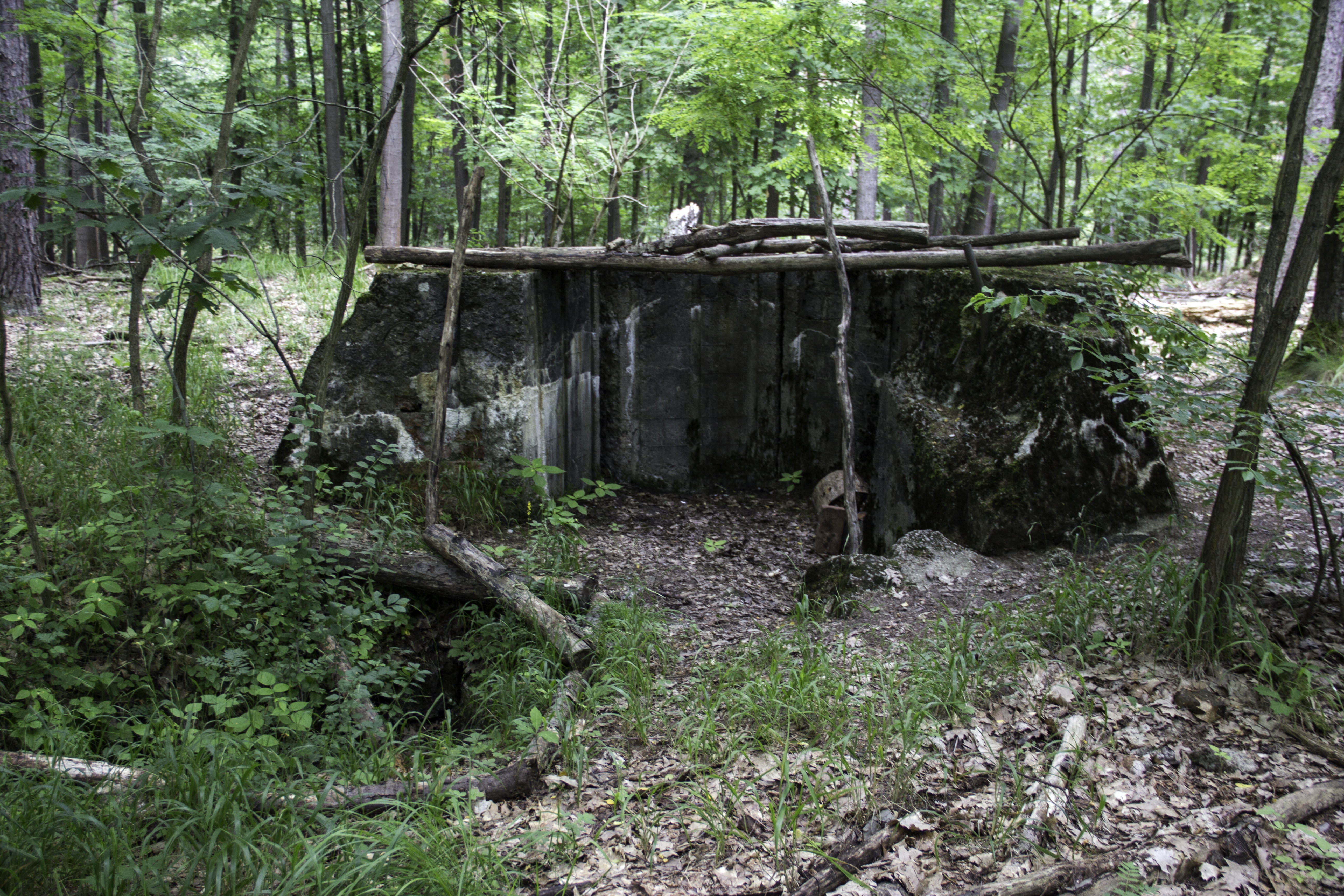 Flakbatterie bei Fischbach